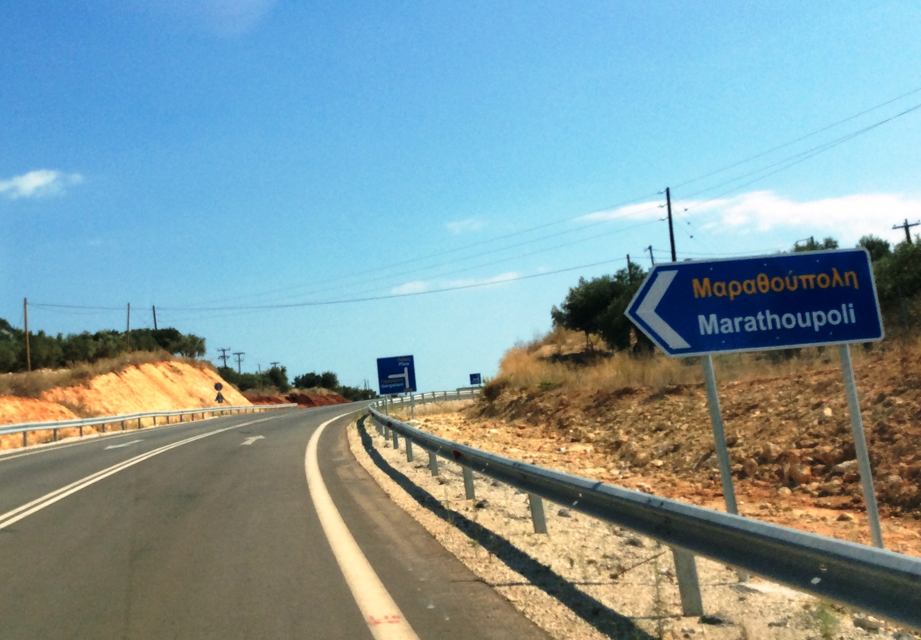 Κατεύθυνση εισόδου προς Μάραθο από τους Γαργαλιάνους.